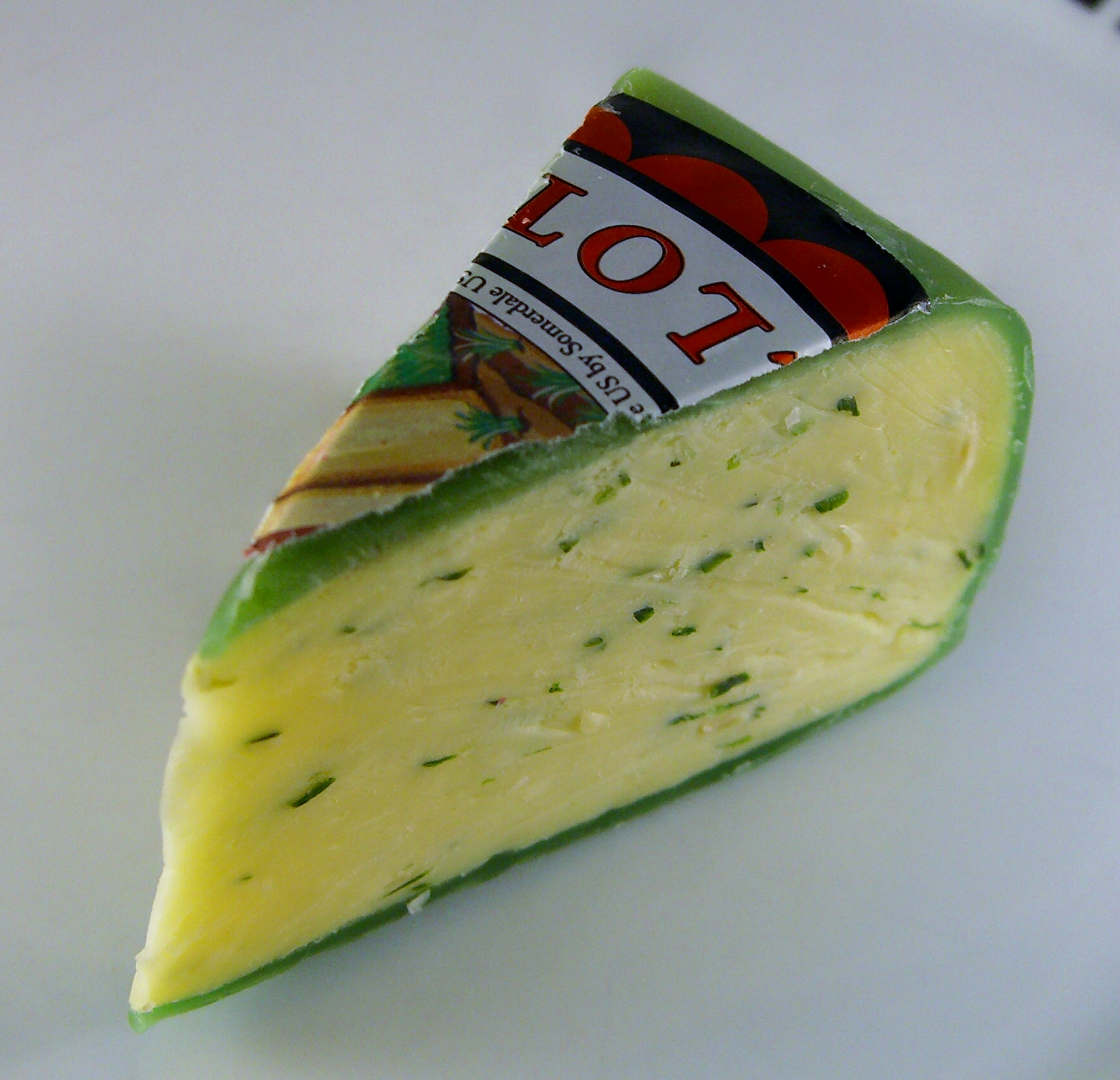 Tintern cheese.